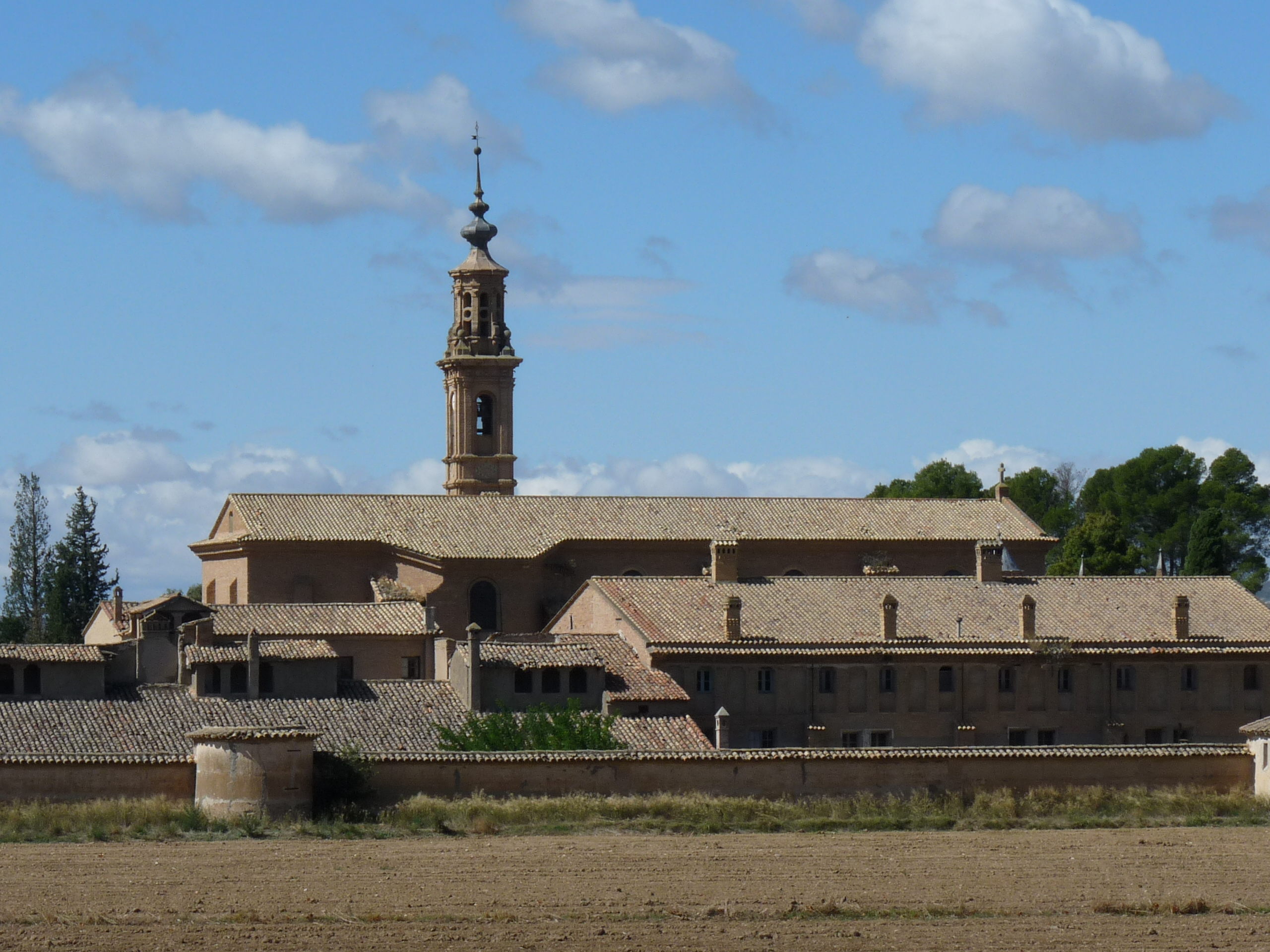 Zaragoza - Cartuja de Aula Dei (s. XVI-XVIII)